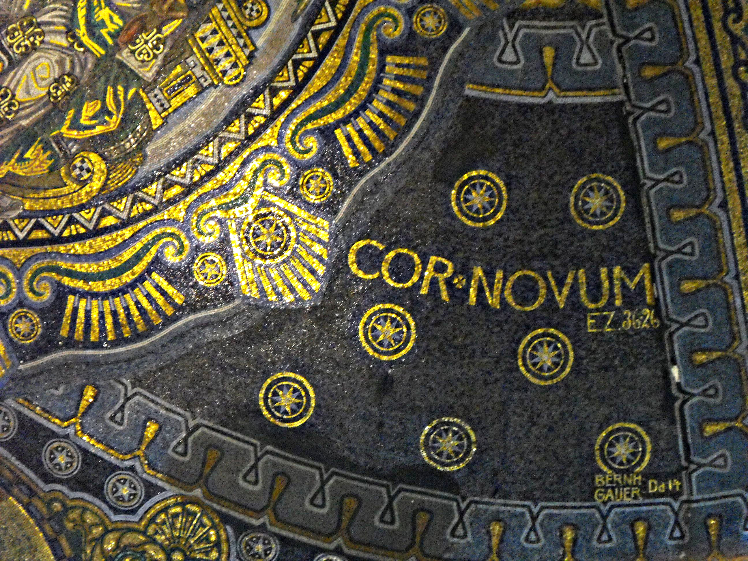 Teil des Mosaiks in der Herz-Jesu-Kirche in Aachen-Burtscheid mit einem Schaden (weiße Fehlstelle, rechts unterhalb von "Novum") hervorgerufen durch das Erdbeben vom 22. Juli 2002 (Richter-Skala: 4,8) in der Aachener Region.